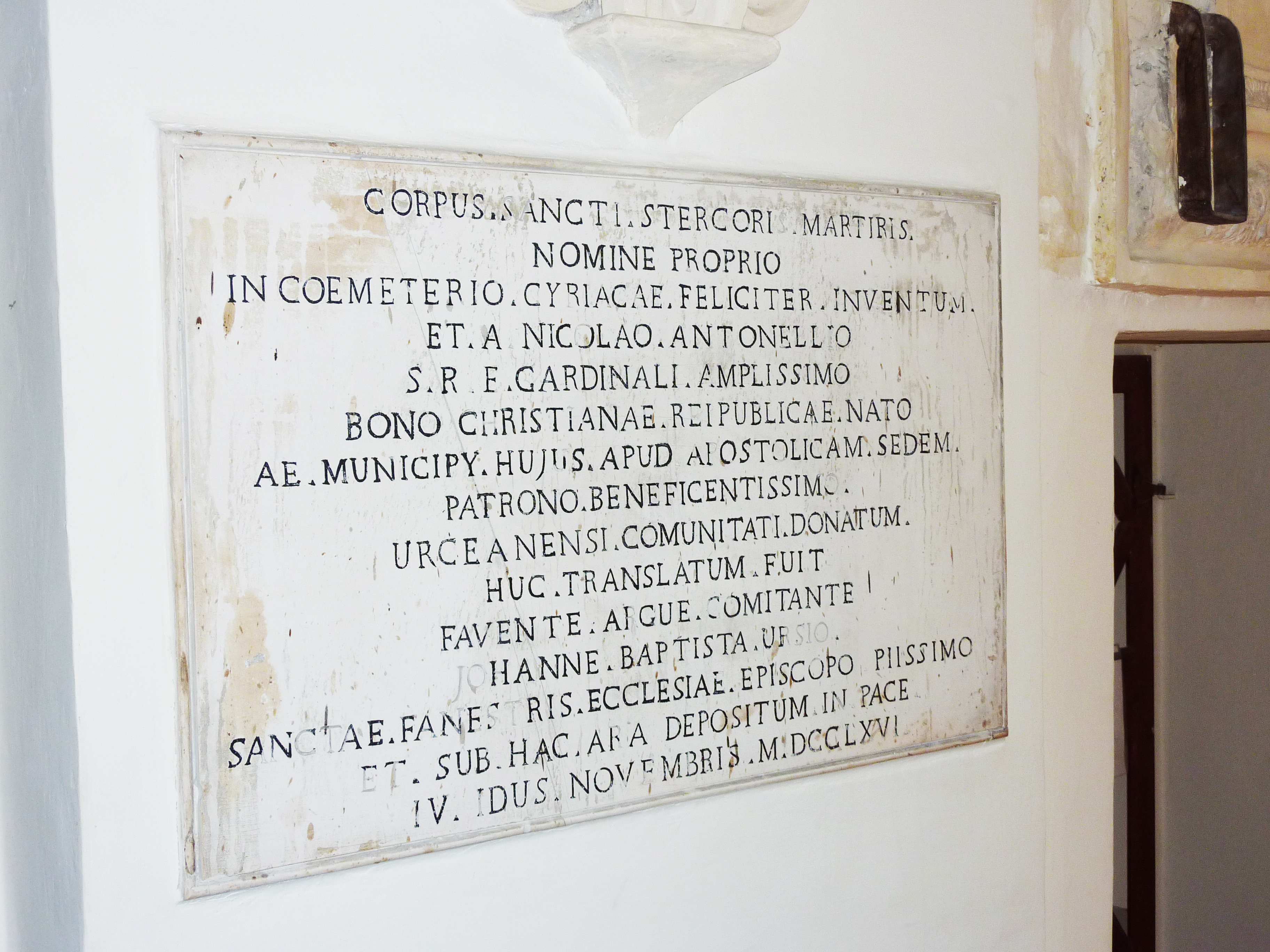 Lapide che attesta la donazione di una reliquia, interno della Chiesa di Santa Maria Novella di Orciano di Pesaro